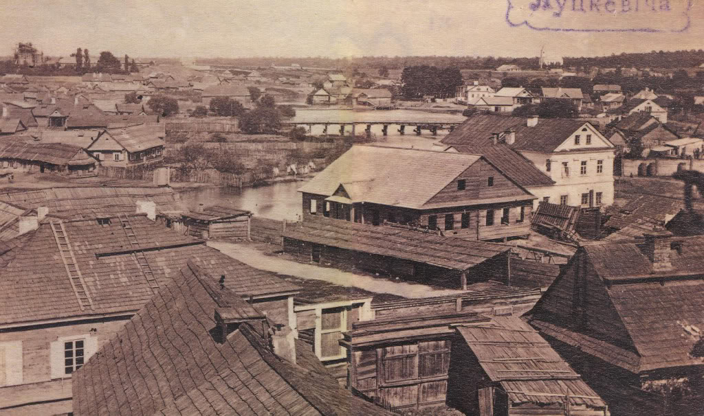 Беларуская (тарашкевіца): Менск (Miensk), Валокі Полацкія (Vałoki Połackija)